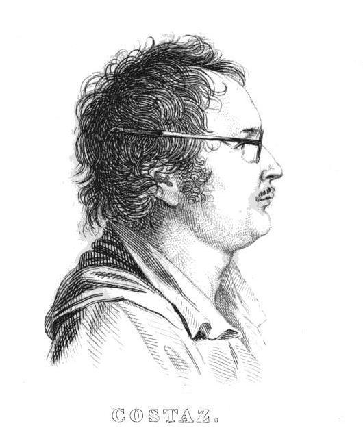 "Costaz"